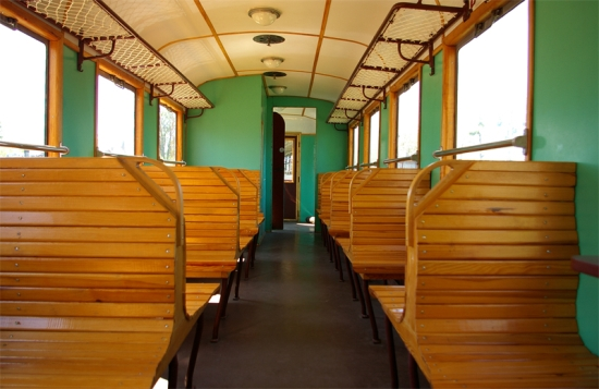 Wnętrze przedziału pasażerskiego wagonu Bxhpi 1685 po pracach rekonstrukcyjnych. Kolej Wąskotorowa Rogów - Rawa - Biała.